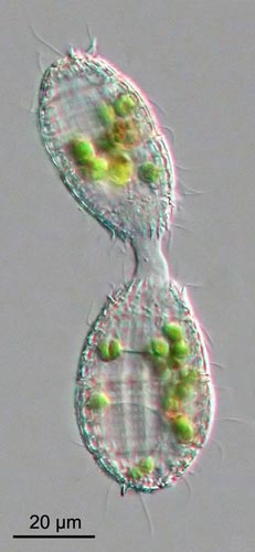 Konjugation zweier Coleps sp.